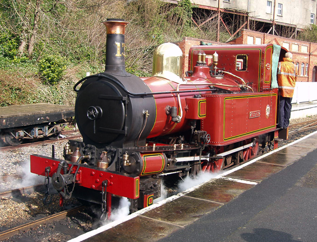 Локомотив железной дороги острова Мэн №13 "Киссак" на станции Дуглас